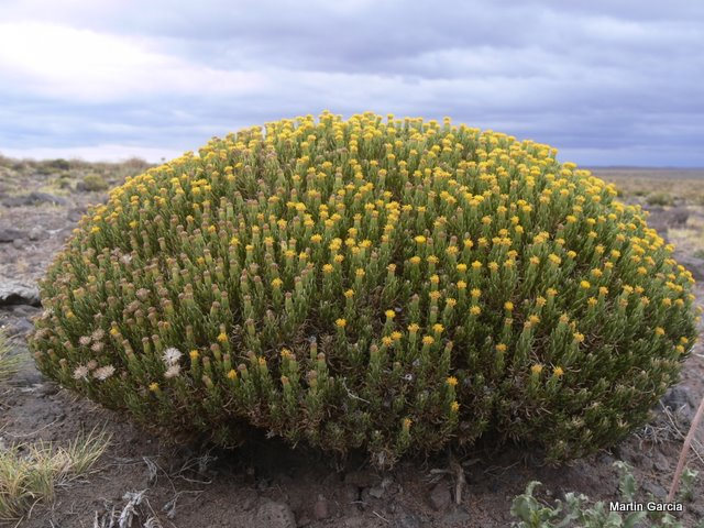 Senecio Filaginoides De Candolle (Charcao)